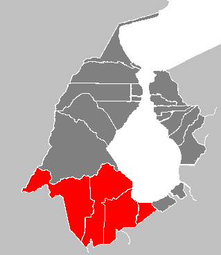 Cantón Zulia (1835 - 1864)